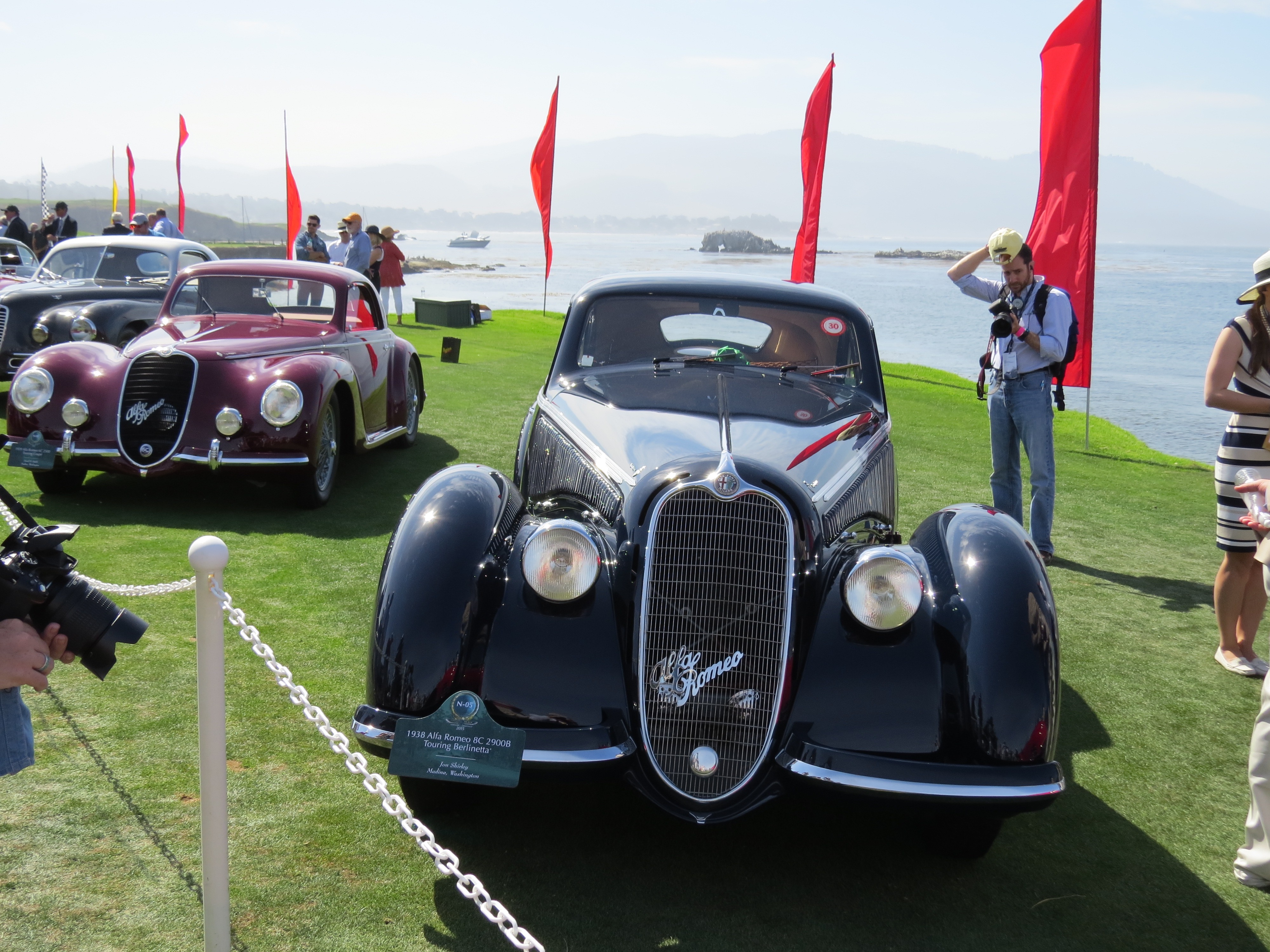 Pebble Beach 2015